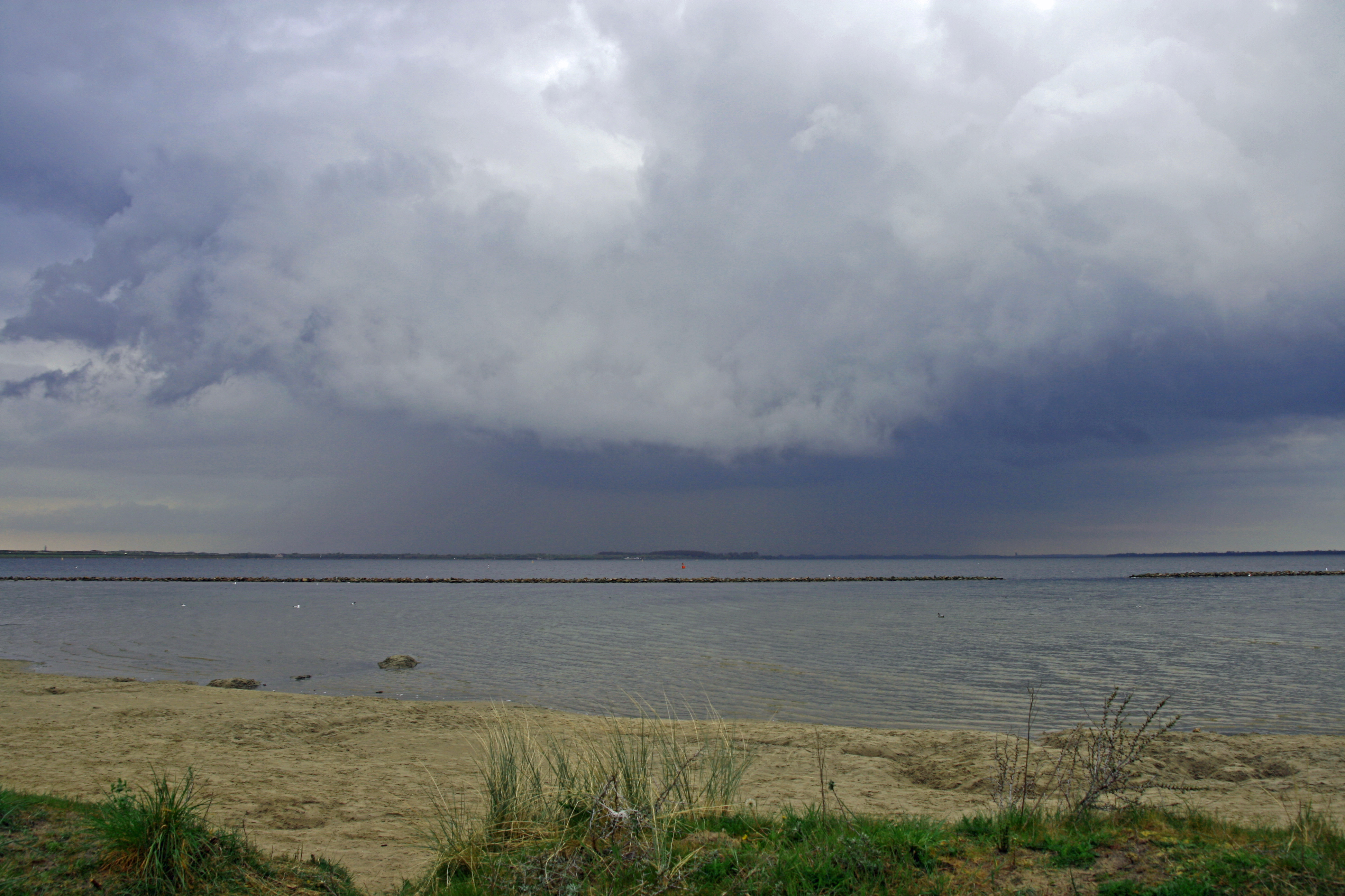 Hevige bui boven Grevelingenmeer